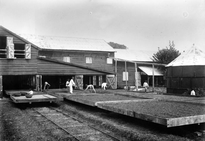 Negatief. Origineel glasnegatief behoort tot de collectie van Stichting Surinaams Museum, Paramaribo; inv. nr. SSM gn 23-112.. Drogen van cacao in de buitenlucht